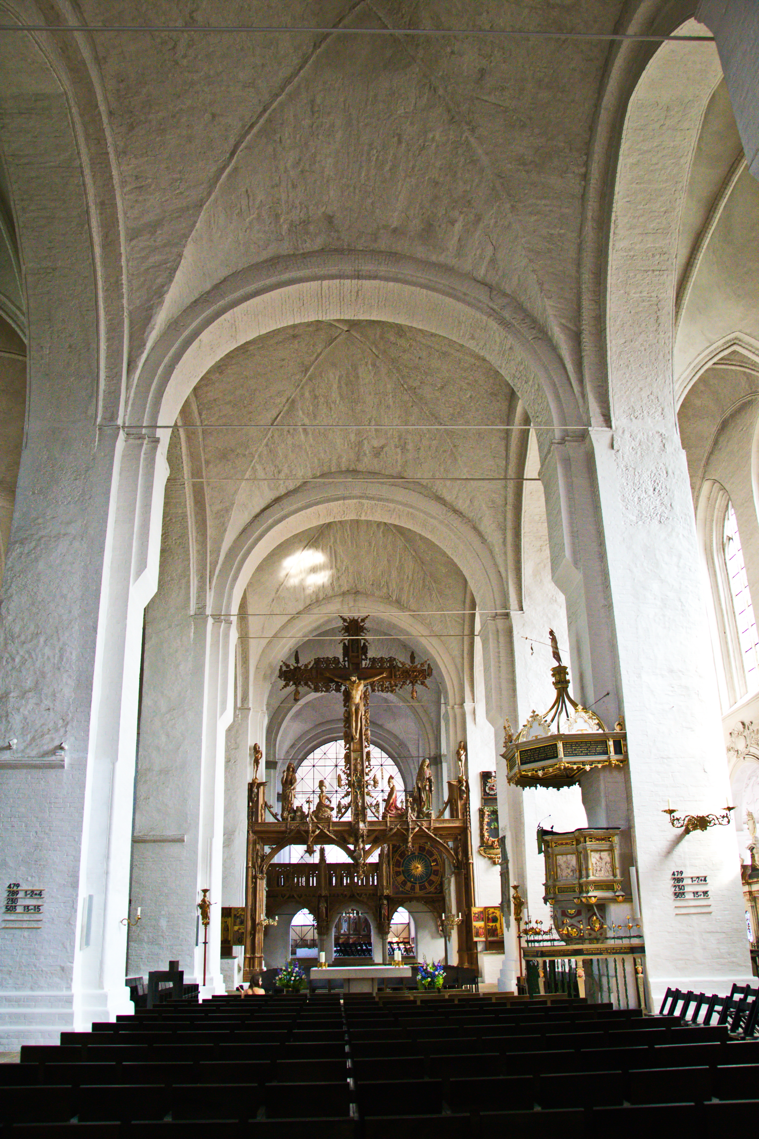 Lübecker Dom